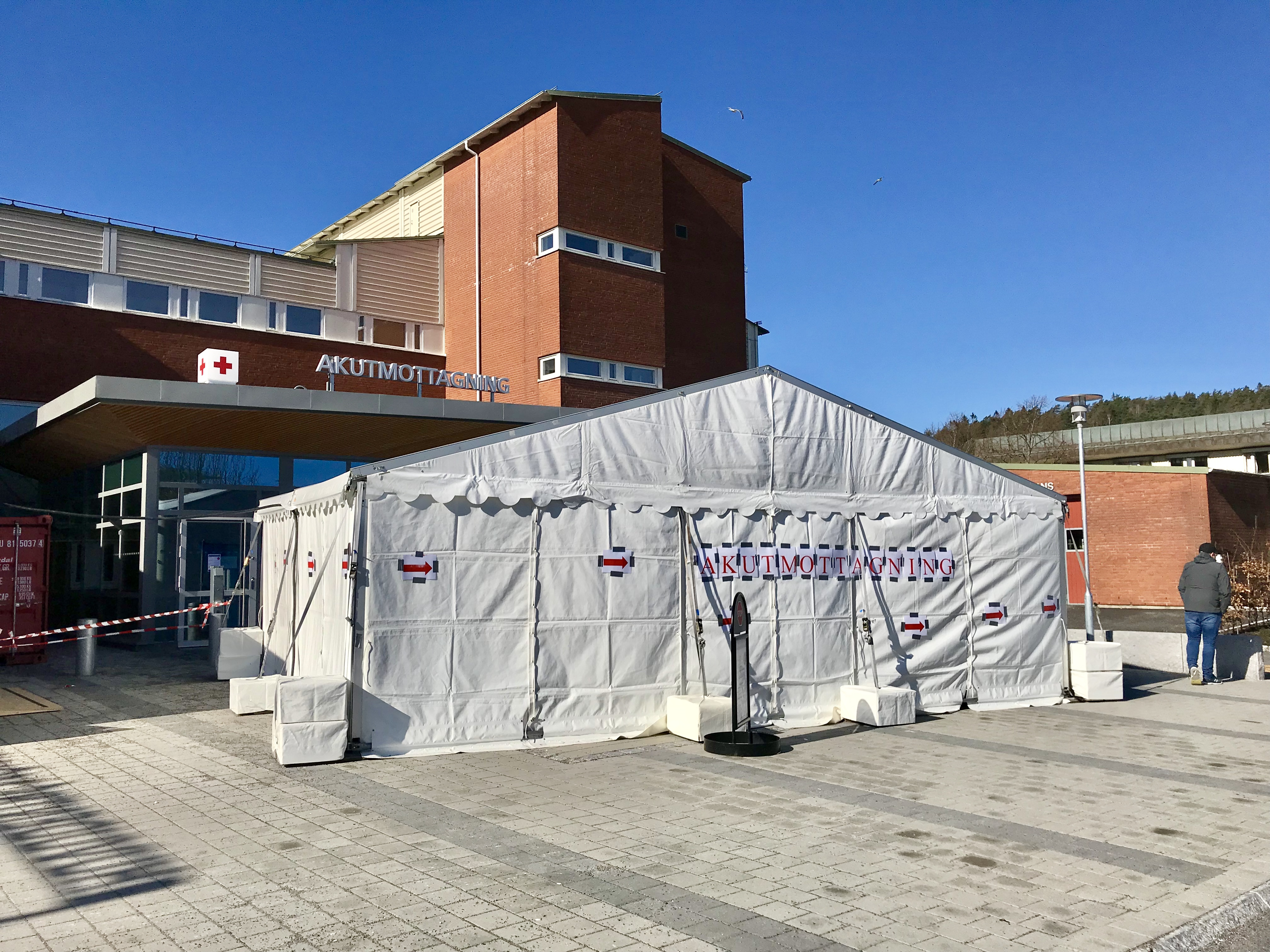 Provtagningstält utanför akutmottagningen vid Mölndals sjukhus i Mölndal, för effektivare sortering av akutfall utan att riskera spridning av covid-19 bland patienter och sjukhuspersonal.